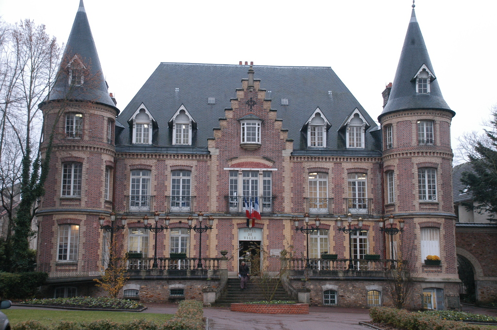 La Mairie De La Ville D'Epinay-Sous-Sénart